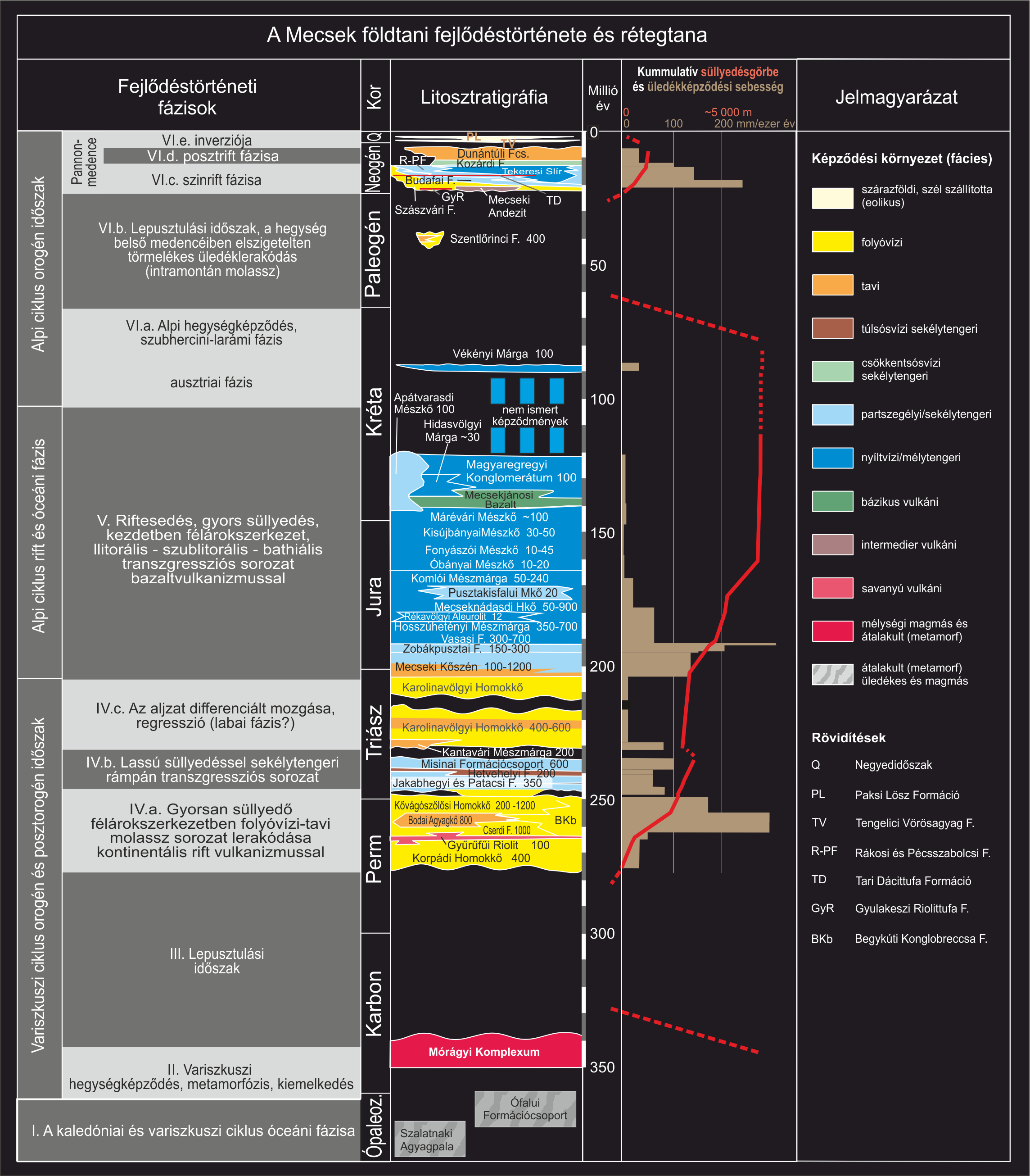 A Mecsek fejlődéstörténeti szakaszai és litosztratigráfiai felosztása. A süllyedésgörbe a képződményvastagságból számított, az üledékképződési sebesség a formáció vastagságából és képződési időtartamából.